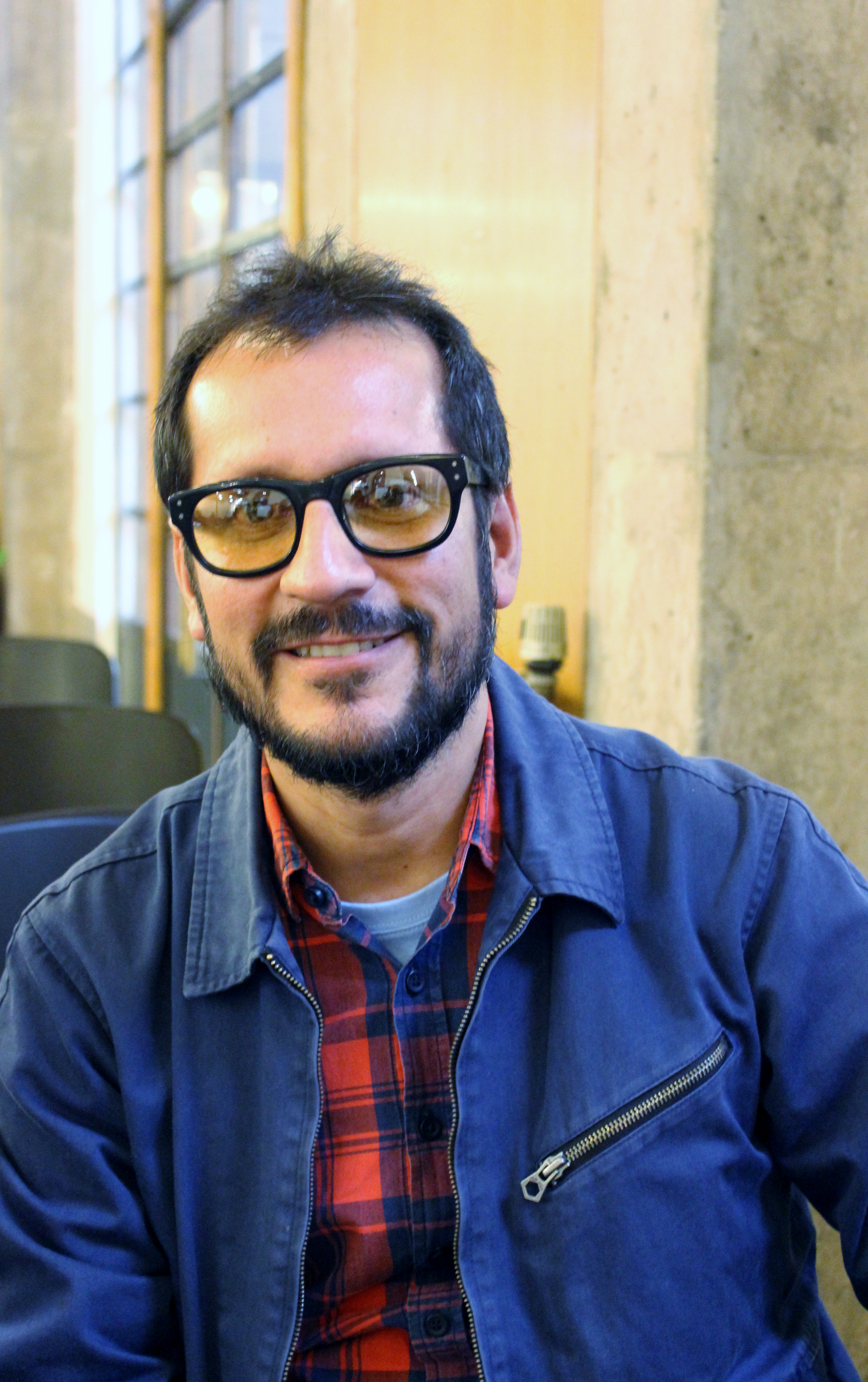 El escritor peruano Sergio Galarza durante la mesa La figura de los padres en la literatura (participaron asimismo Alejandra Costamagna y Diego Zúñiga ), realizada en la Feria Internacional del Libro de Santiago 2018 (sala Lily Garafulic, 1 de noviembre).